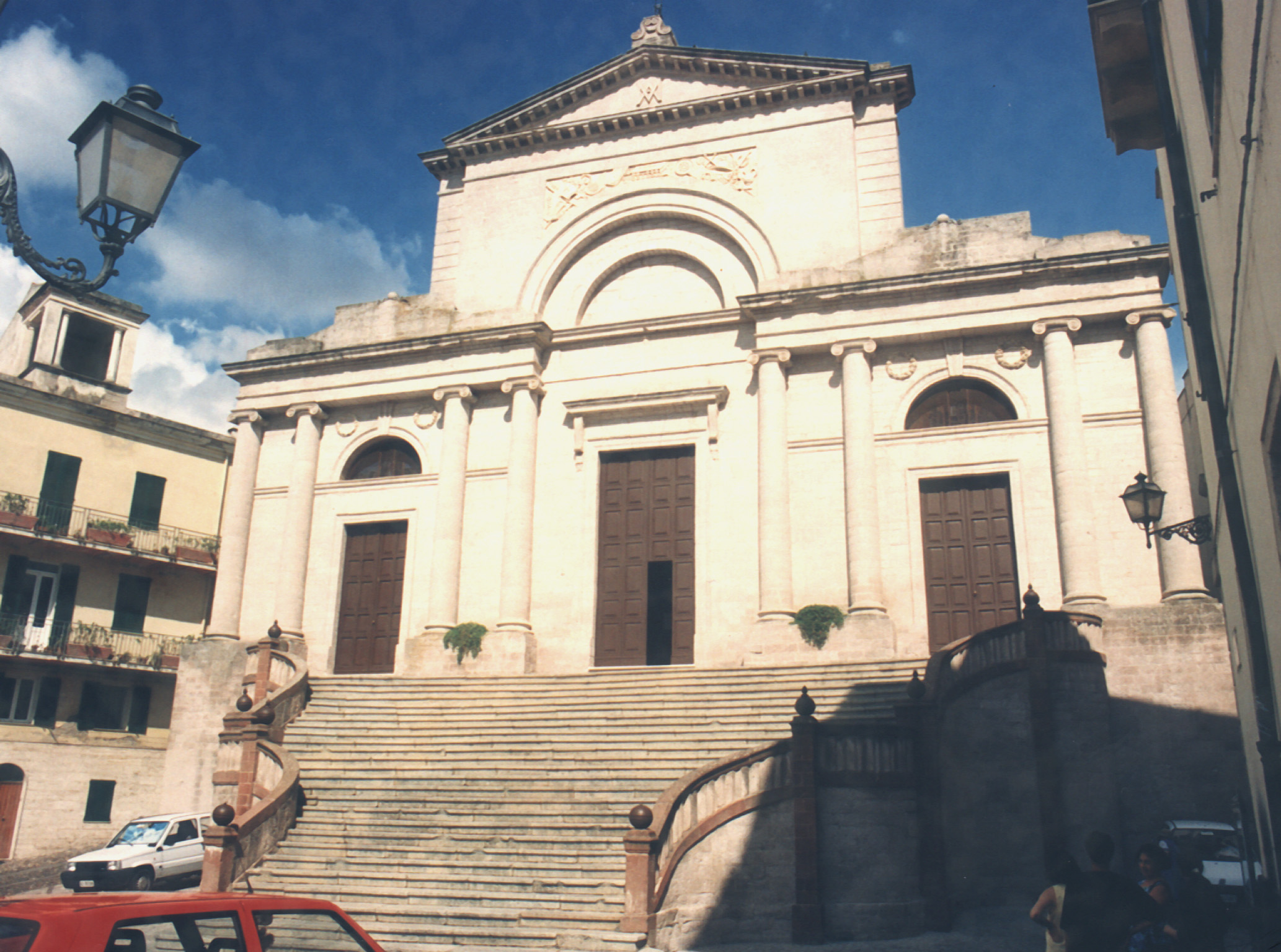 Facciata del Duomo di Ozieri - Sardegna